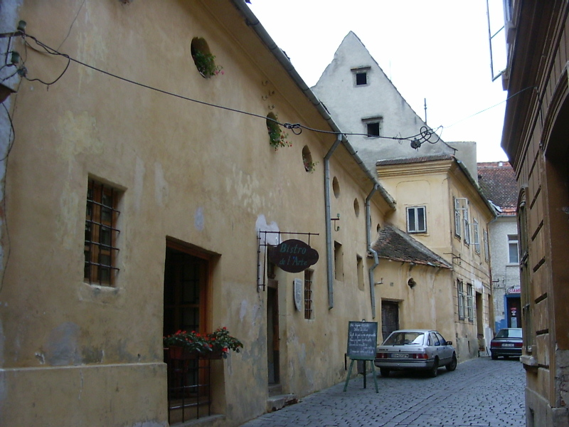 17. century granary at Pţa Enescu (Rosenanger), Braşov, Romania